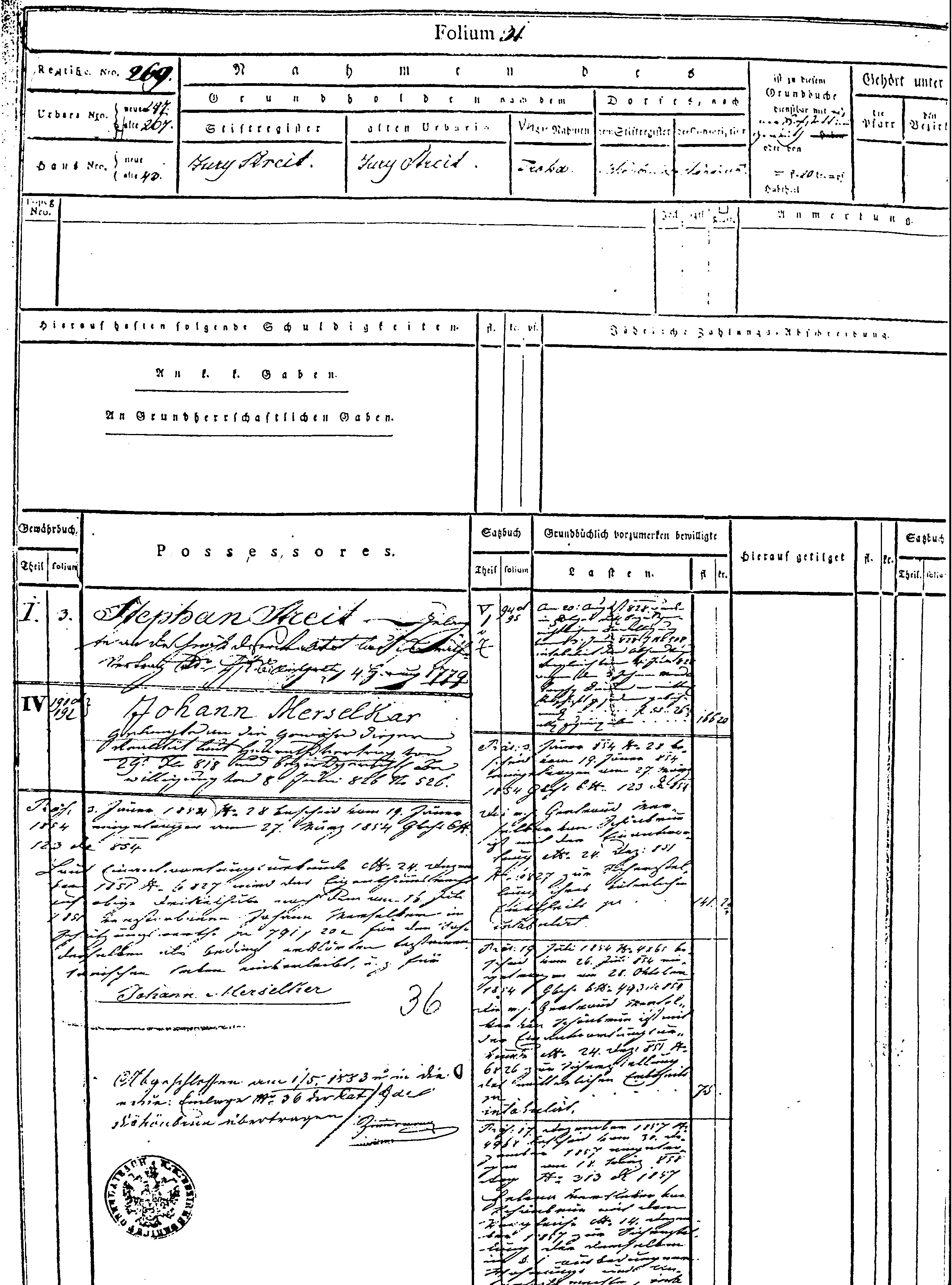 Stara zemljiška knjiga za sodni okraj Vrhnika, gospostvo Polhov Gradec, vložek iz glavne knjige, 1830-1883. Na vrhu je posestni del, levo spodaj lastninski del, desno spodaj bremenski del. Čisto na vrhu zgoraj levo so številke, ki se nanašajo na urbarje. Nad pečatom je zaznamek, da je bila vsebina leta 1883 prenešena v novo zemljiško knjigo.